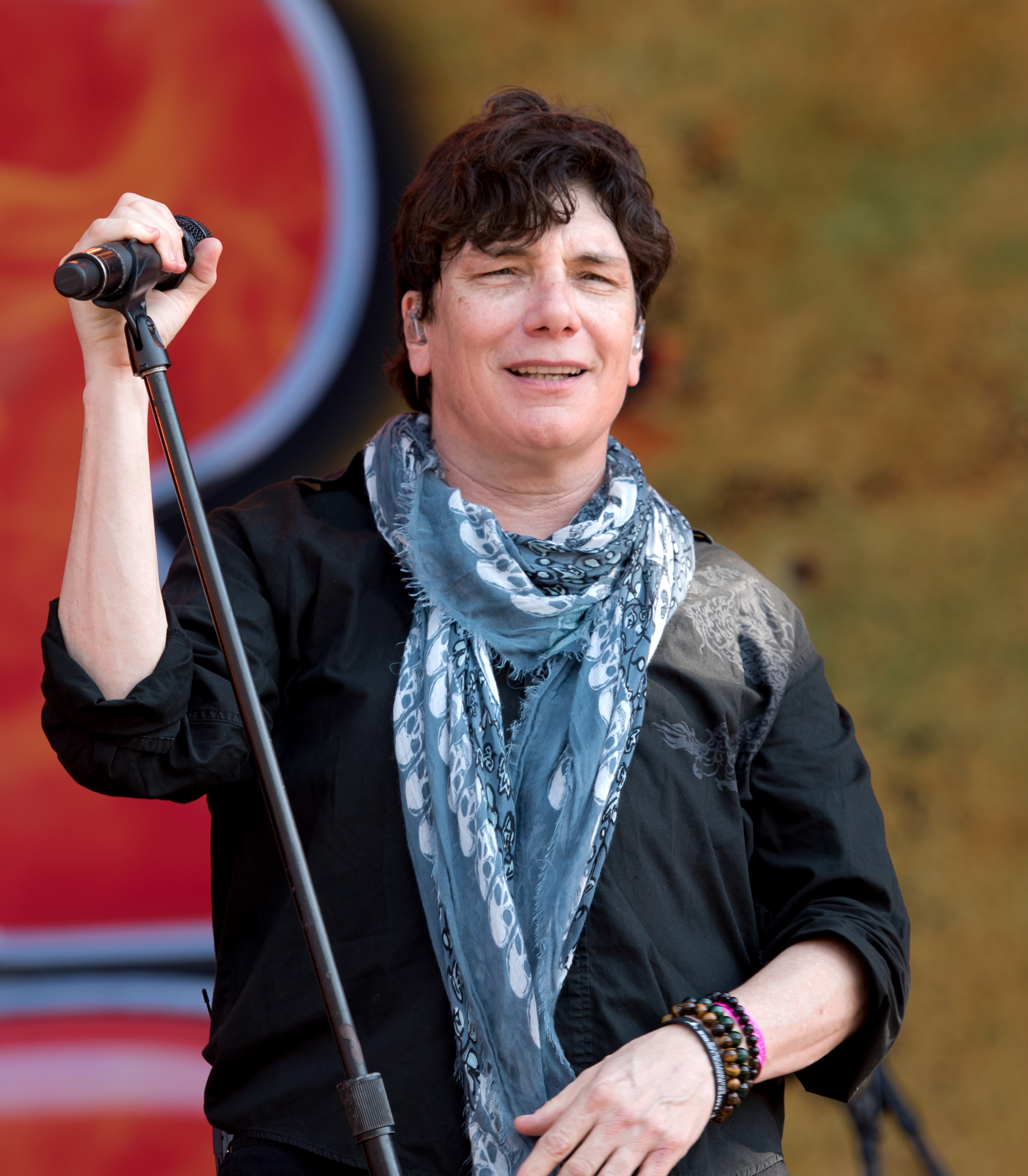 Mr. Big beim Wacken Open Air 2018